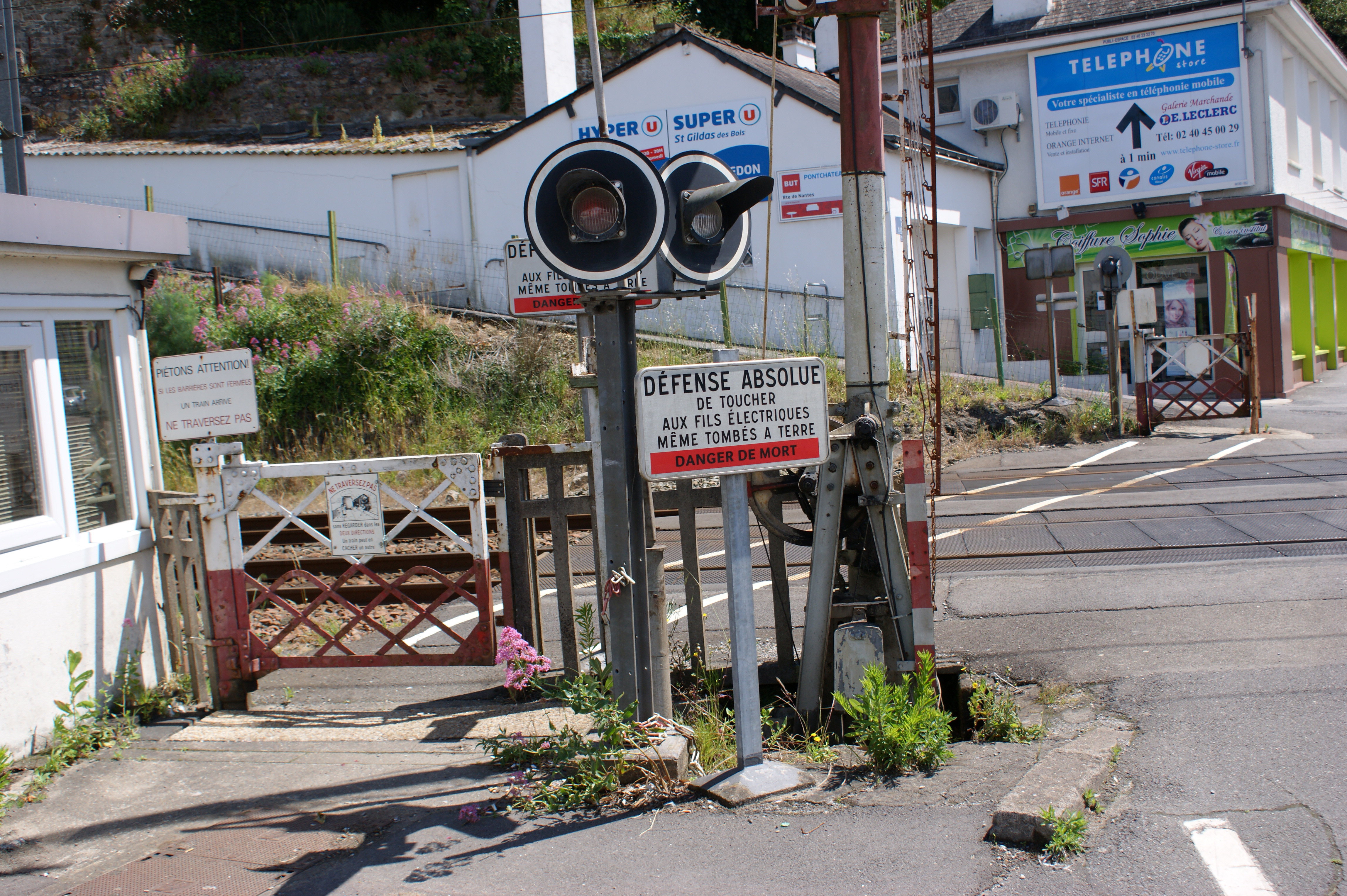 Détail du passage à niveau manuel n°378 à Pontchâteau, situé entre la gare et le tunnel. À gauche le petit bâtiment du garde.